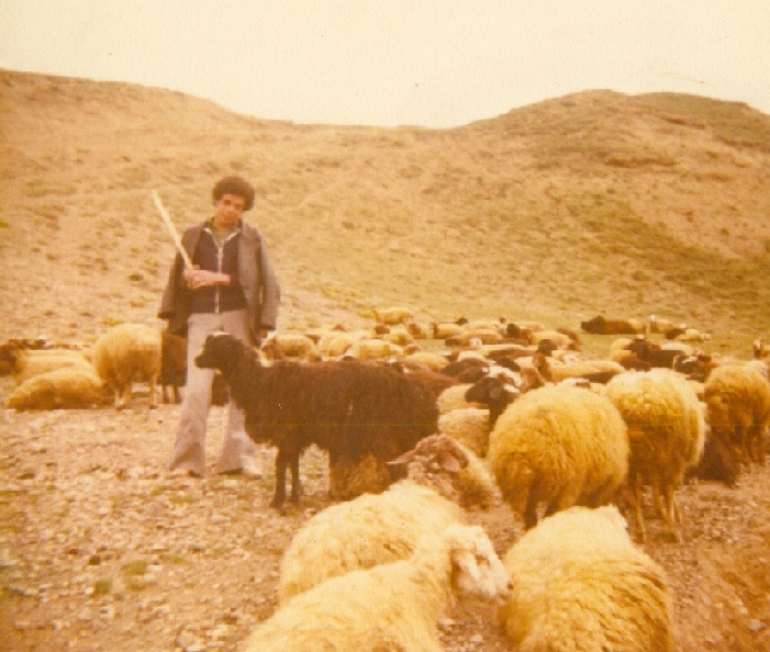 عکس از دامداری سنتی در روستای باریکان -مزرعه باریکلو